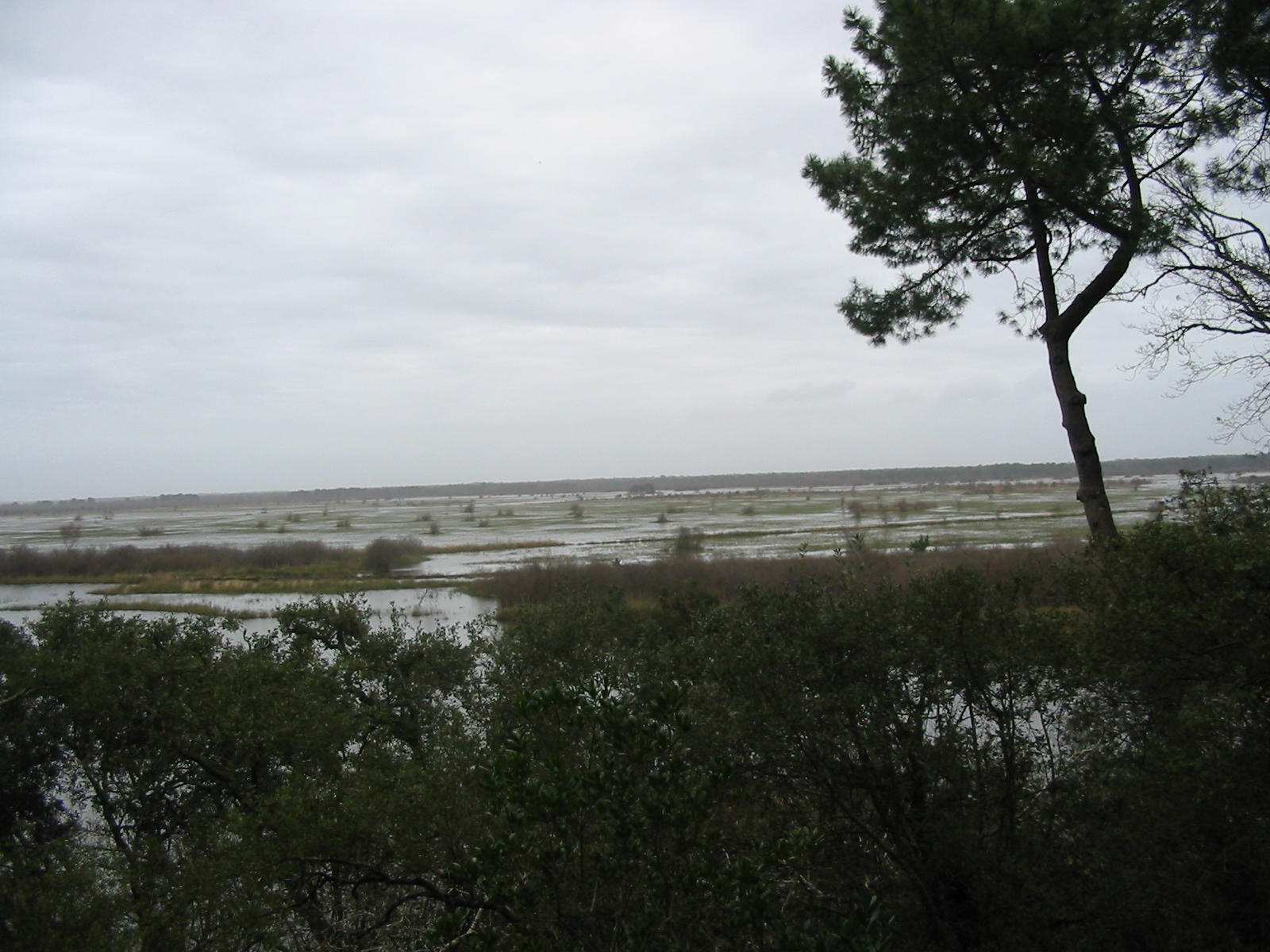 Etang de Cousseau in Lacanau, France.